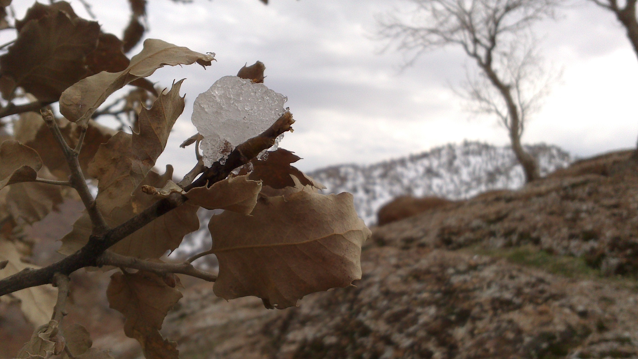 بارش برف در تنگه ی دهلیج پلدختر